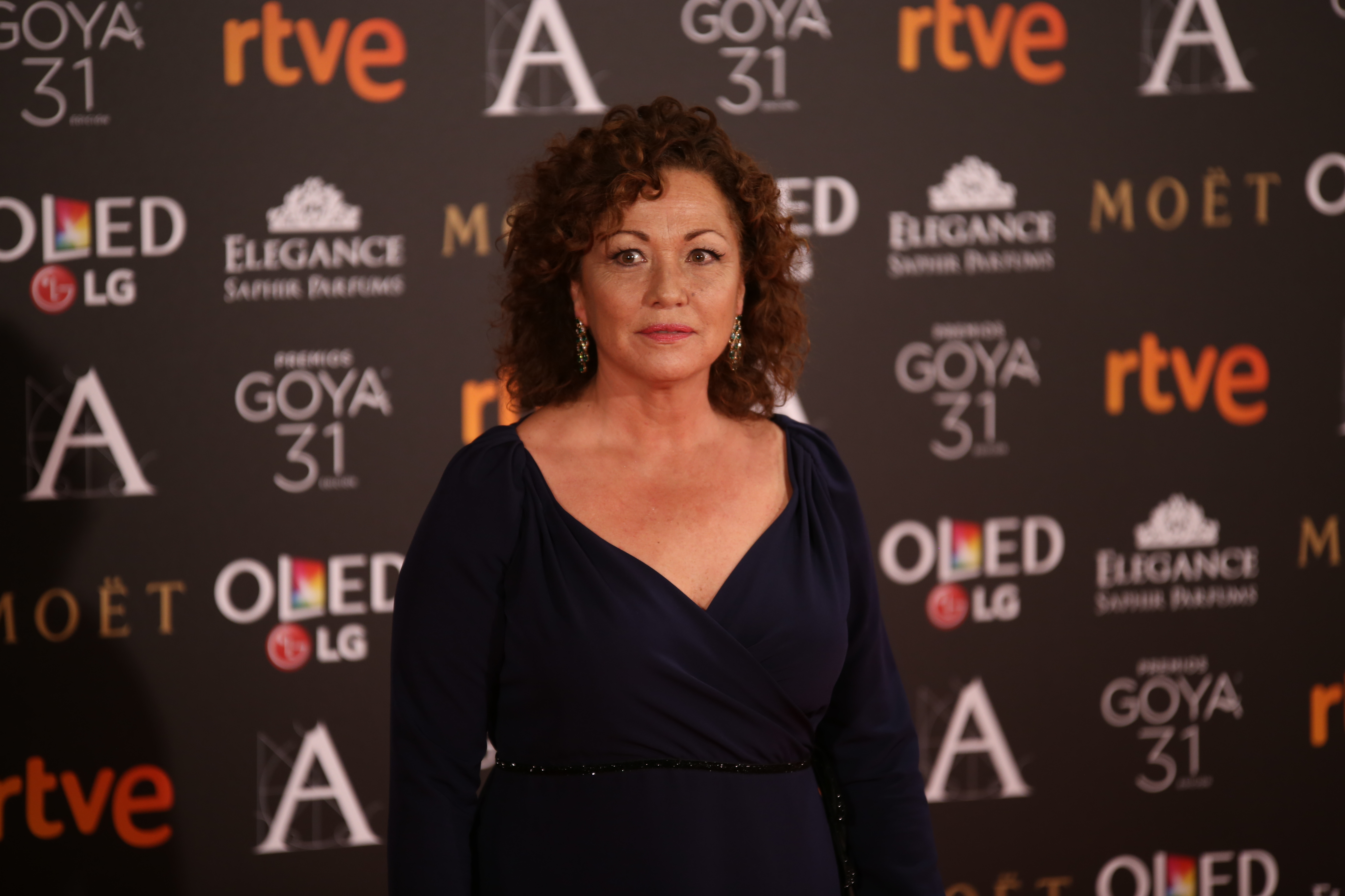 Premios Goya 2017